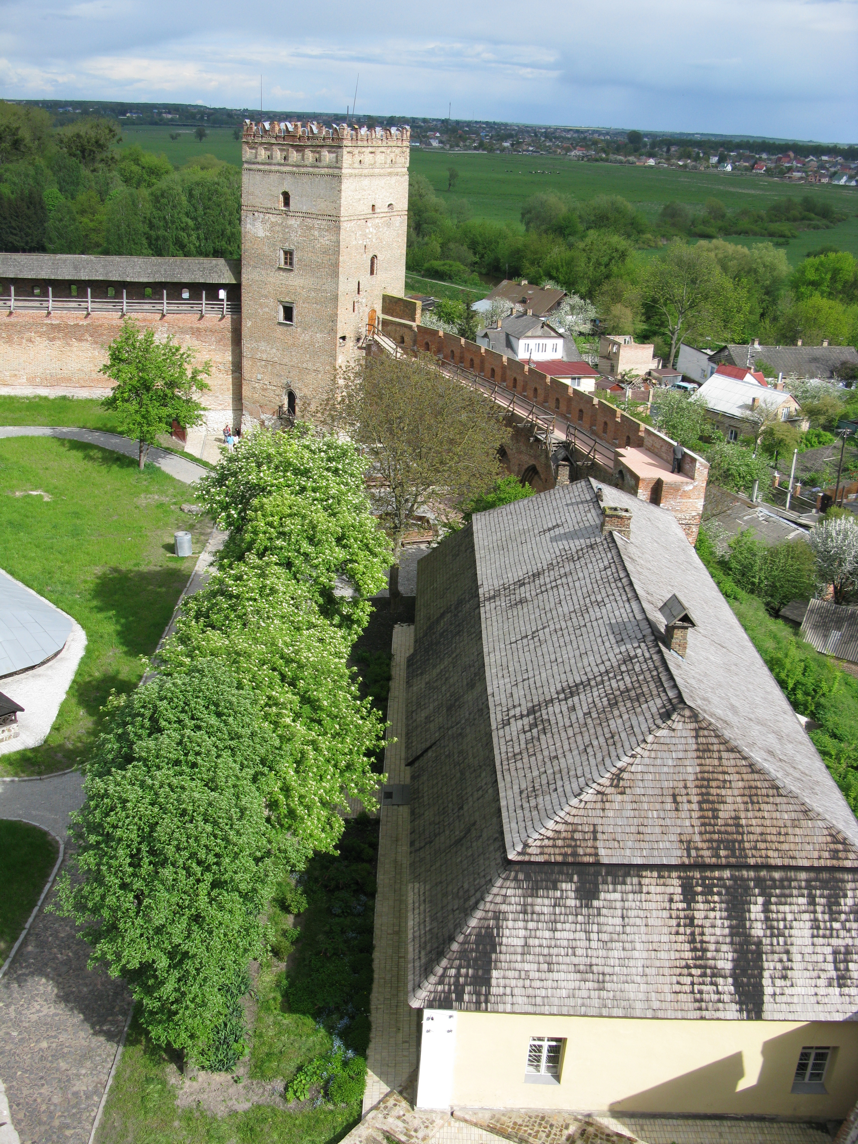 Луцький замок.